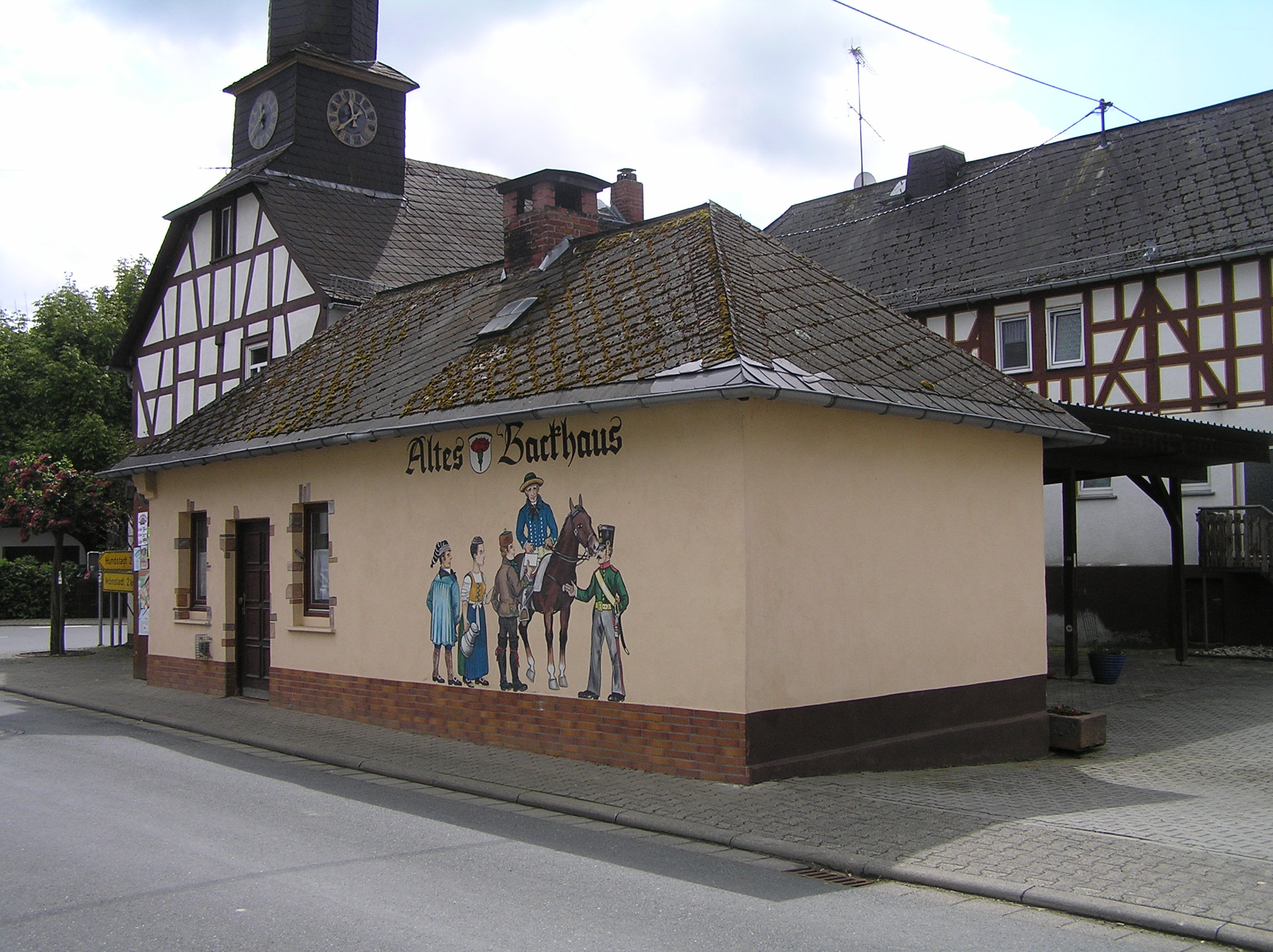 Altes Backhaus in Naunstadt, Grävenwiesbach